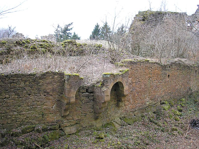 Burg Rauheneck (Haßberge). Der einsturzgefährdete Schießerker des Zwingers.